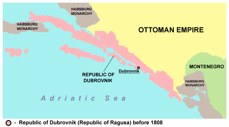 Historic map of the Republic of Dubrovnik (Republic of Ragusa), before 1808. Povijesna karta Dubrovačke republike, prije 1808. Istorijska karta Dubrovačke republike, pre 1808.